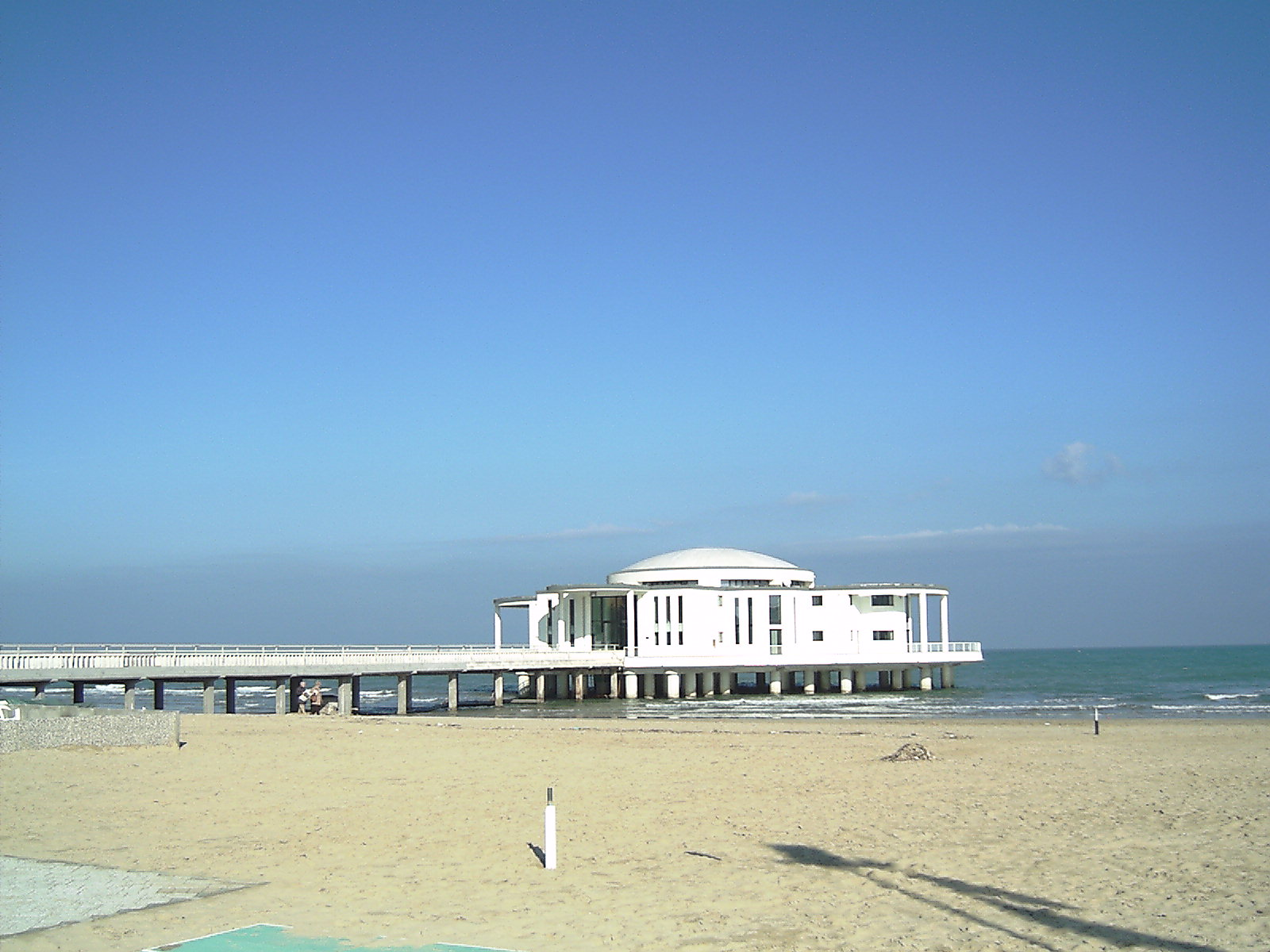 La Rotonda a Mare (2003)